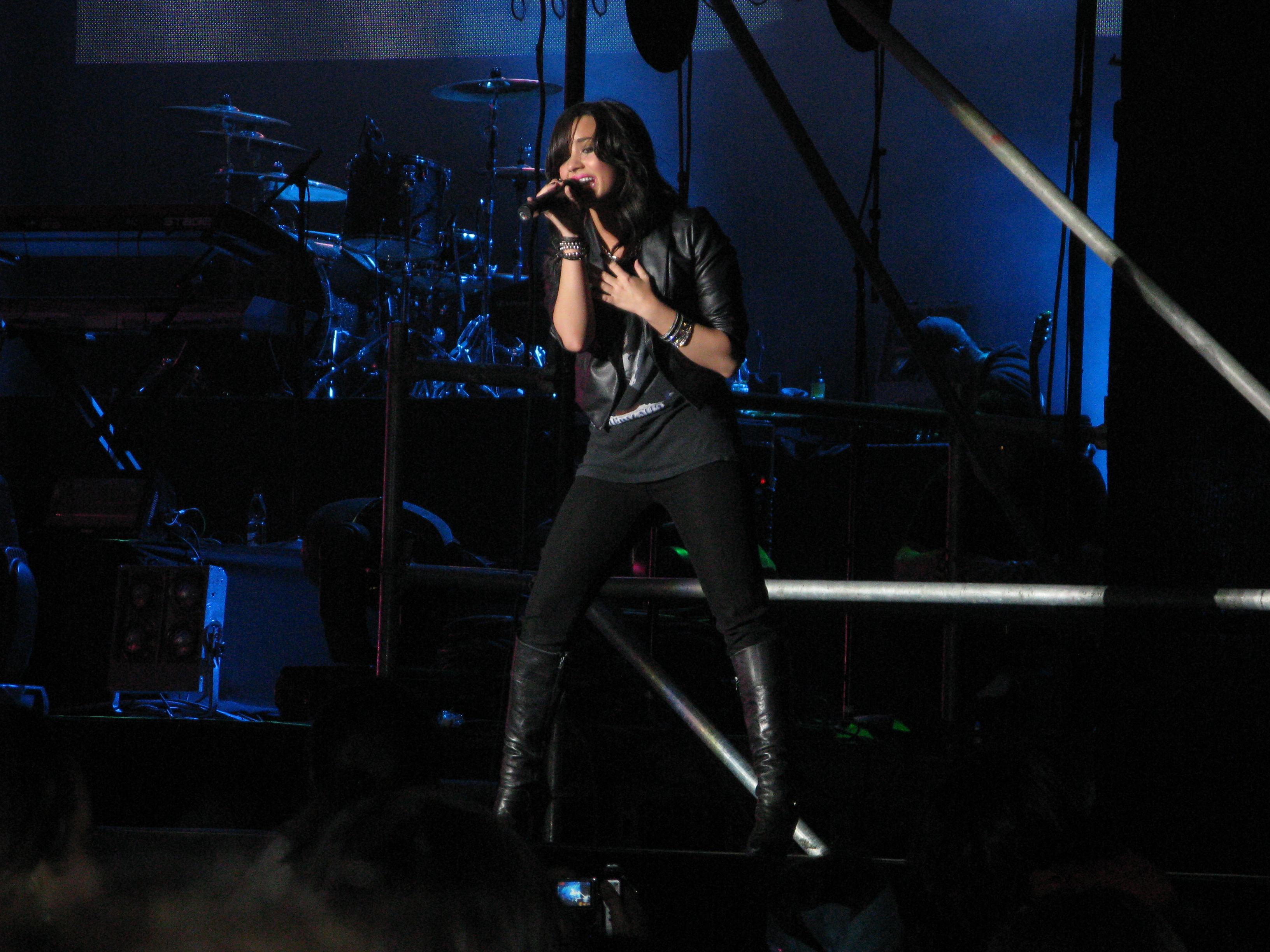 Demi Lovato abrindo o show dos Jonas Brothers no Chile.